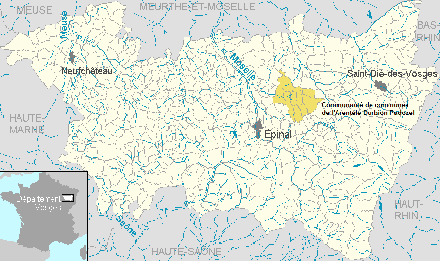 Communauté de communes de l'Arentèle-Durbion-Padozel dans le département des Vosges, Lorraine, France